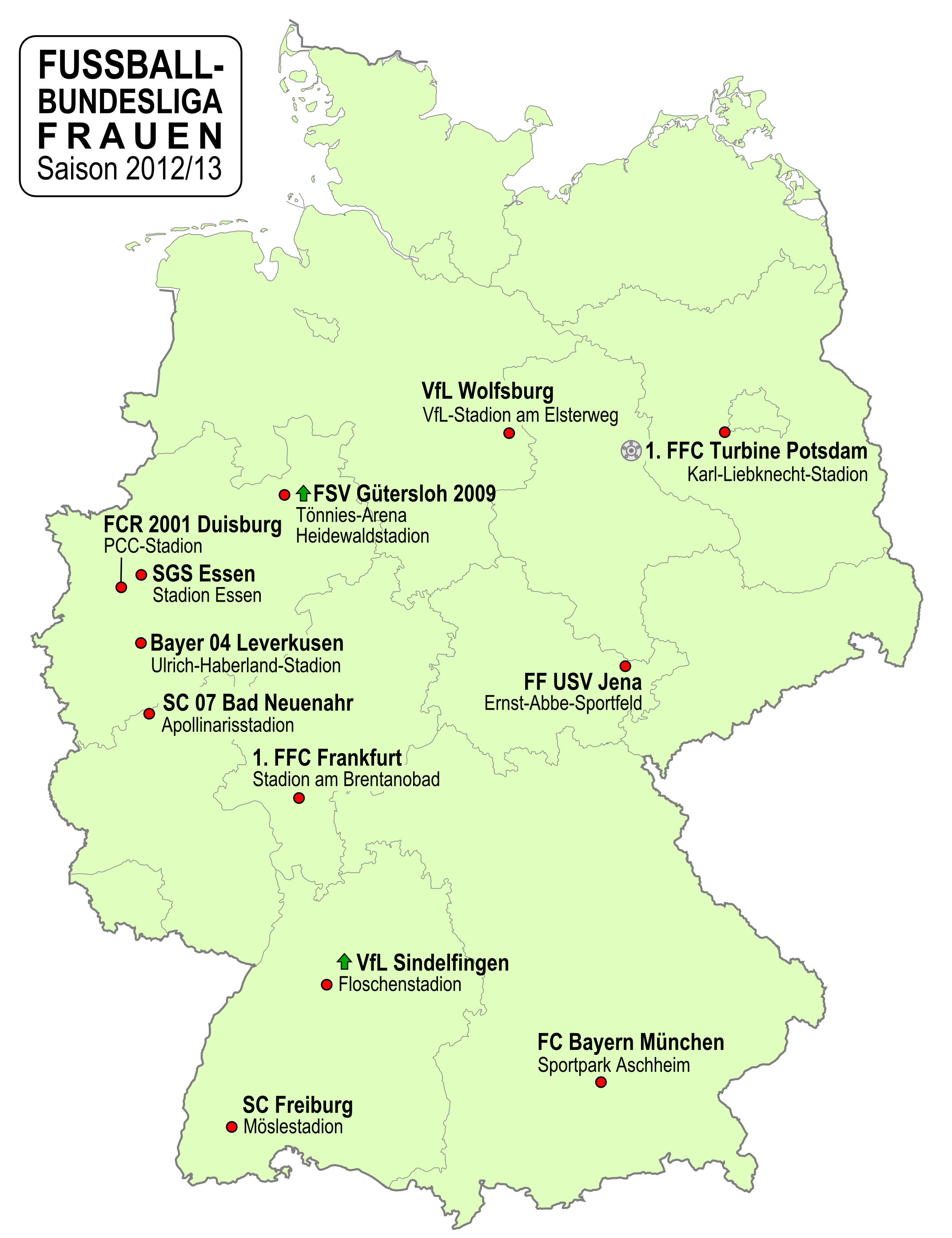 Karte der Vereine der Frauen Fußball-Bundesliga-Saison 2012/2013